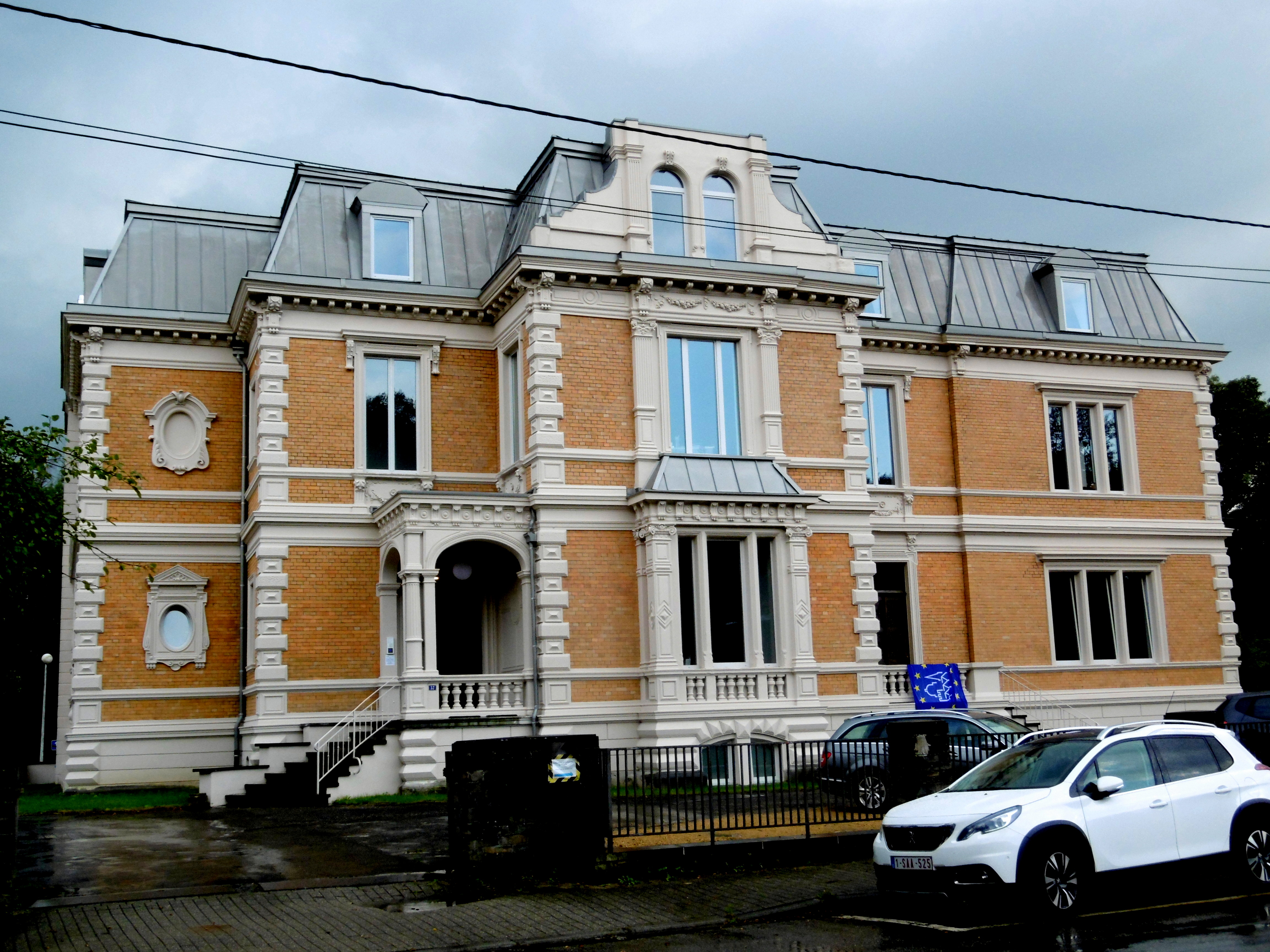 Villa Peters in Eupen, heute Musikakademie, Außenansicht von Norden